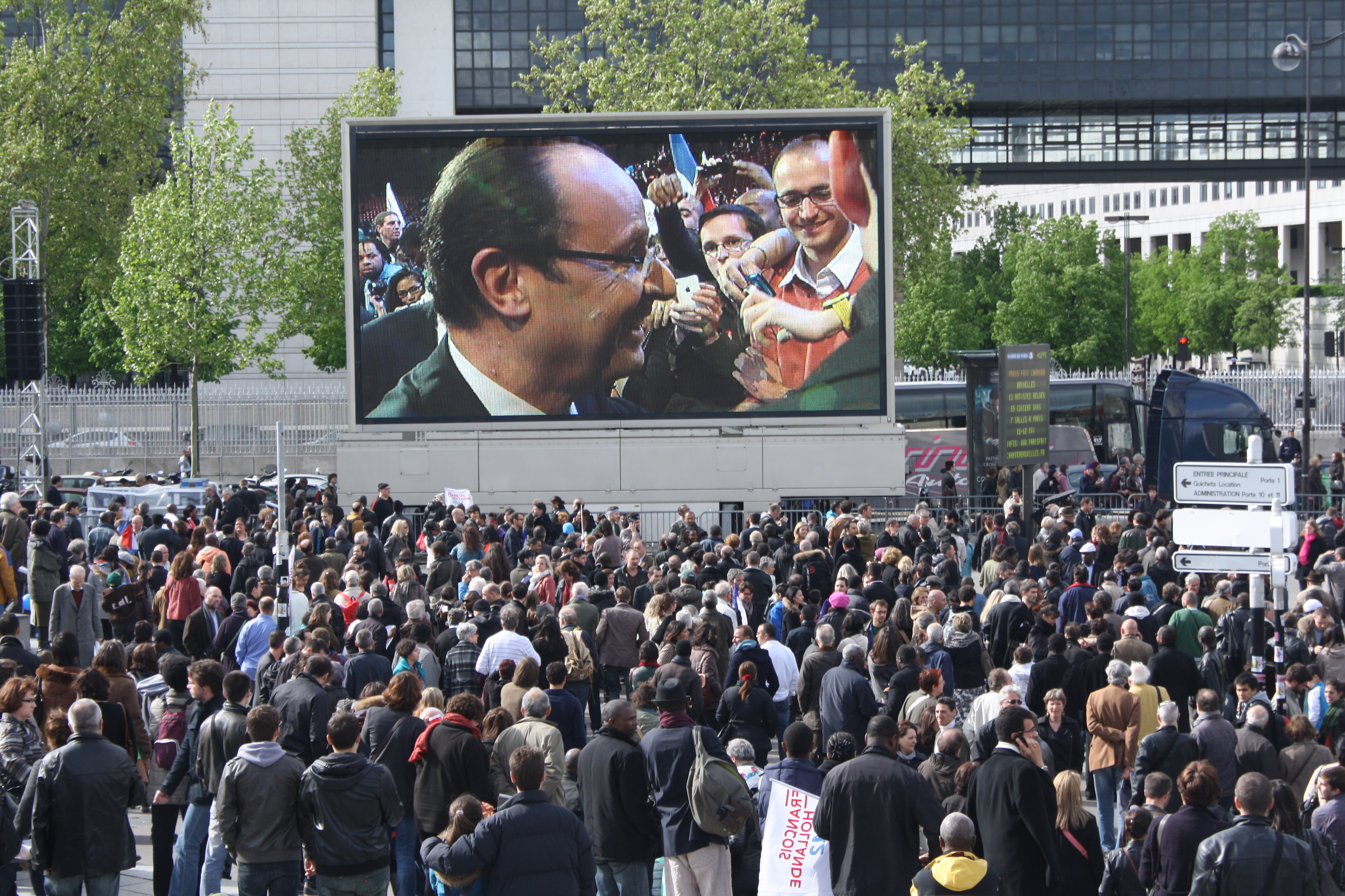 Dernier meeting parisien pour François Hollande une semaine avant le second tour de l'élection présidentielle, le 29 avril 2012, à Bercy. Quelques instantanés du côté des militants.